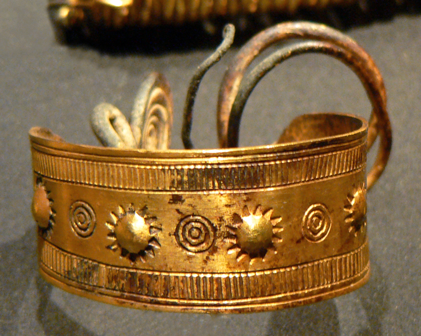 Fibel des Goldhorts von Gessel, Aufnahme bei der Pressekonferenz zur Eröffnung der Ausstellung im Niedersächsischen Landesmuseum Hannover zur Schau Im Goldenen Schnitt - Niedersachsens längste Ausgrabung